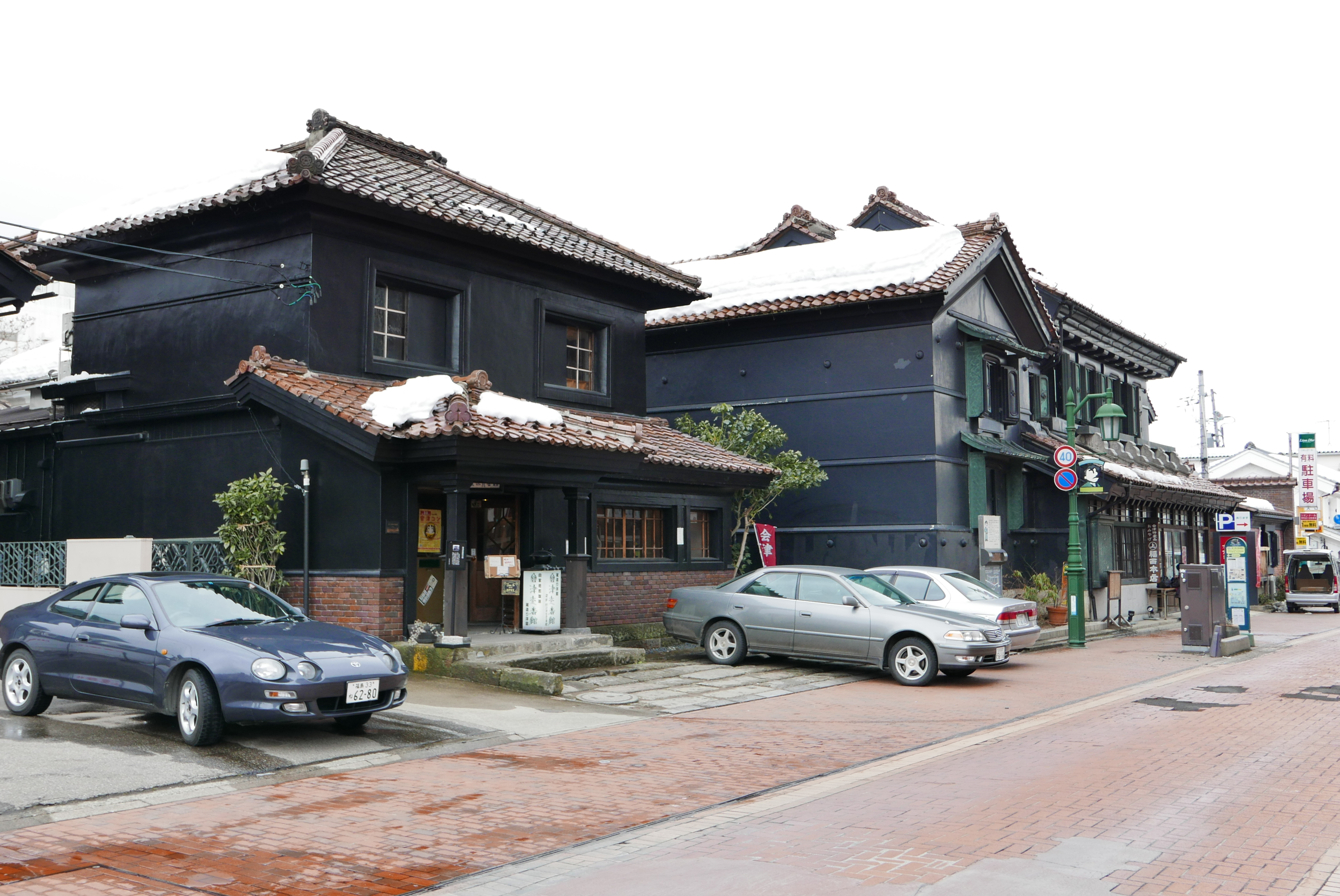 野口英世青春館・会津壹番館（旧会陽医院、左側の建物）